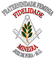 Timbre da Fraternidade Feminina entidade paramaçônica associada à fidelidade Mineira